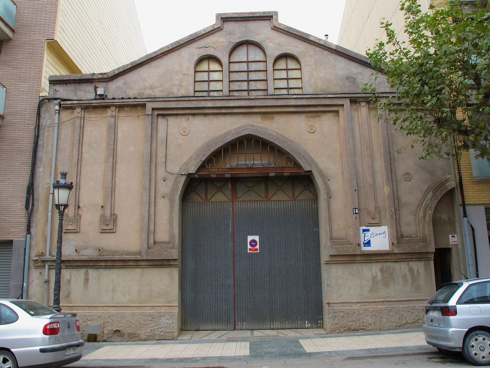 Edifici al passeig de Sant Calamanda (Calaf)